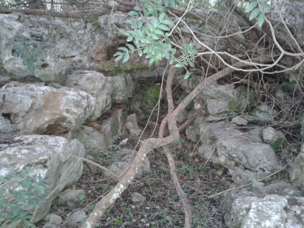 Talaïot 2